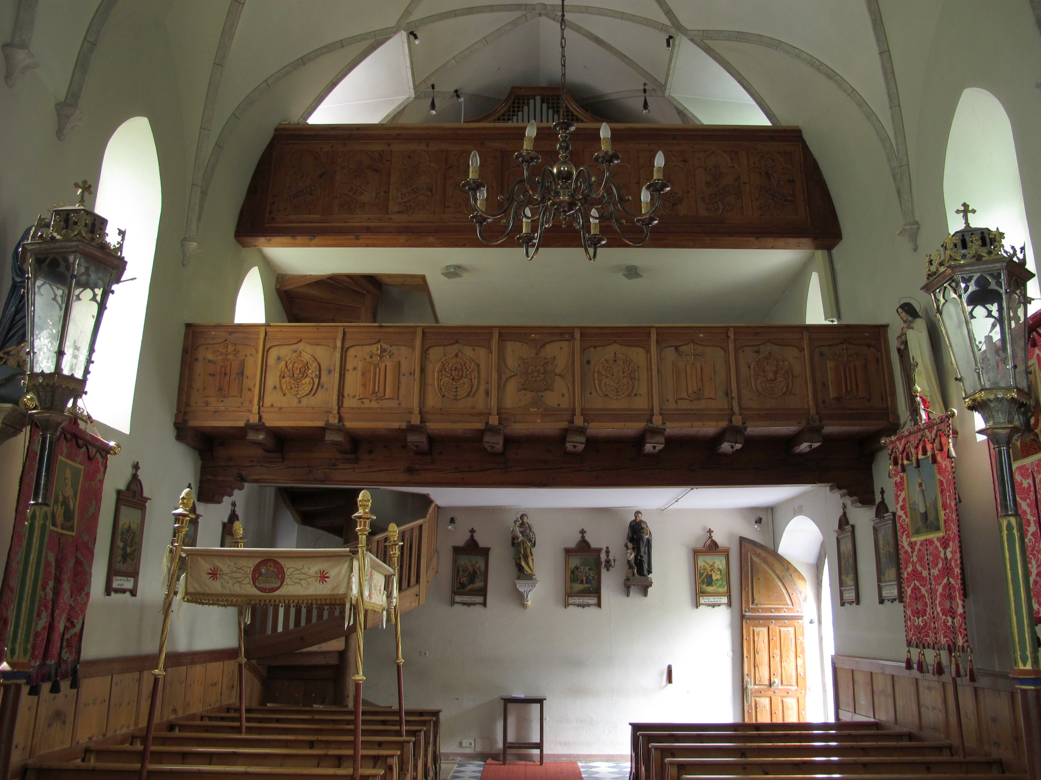 Karthaus im Schnalstal (Südtirol): Kirche St. Anna, Empore